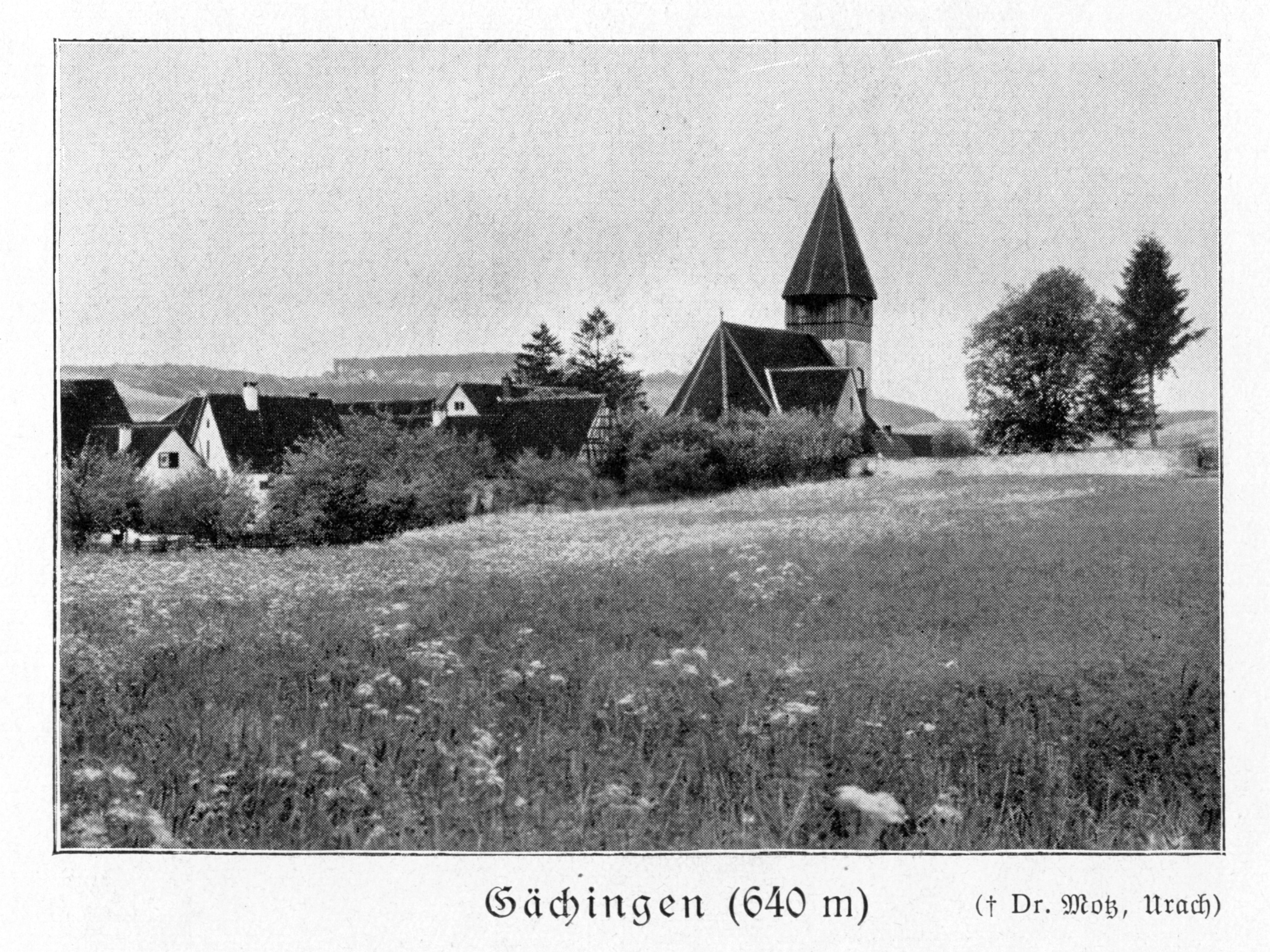 Gächingen (640m), heute St. Johann